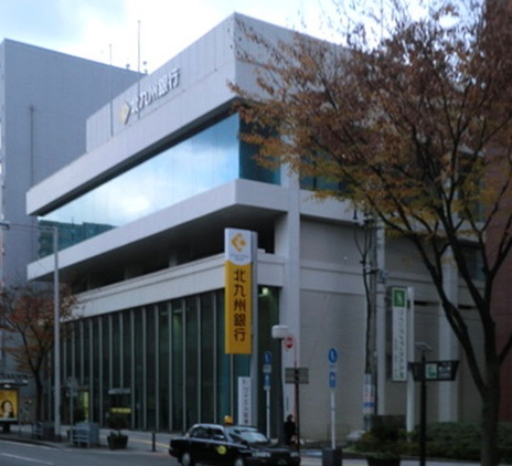 北九州市の北九州銀行です。